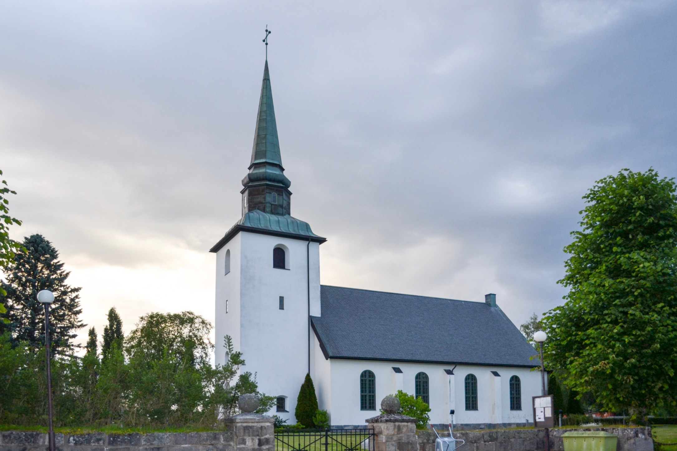 Blomskogs kyrka från höger